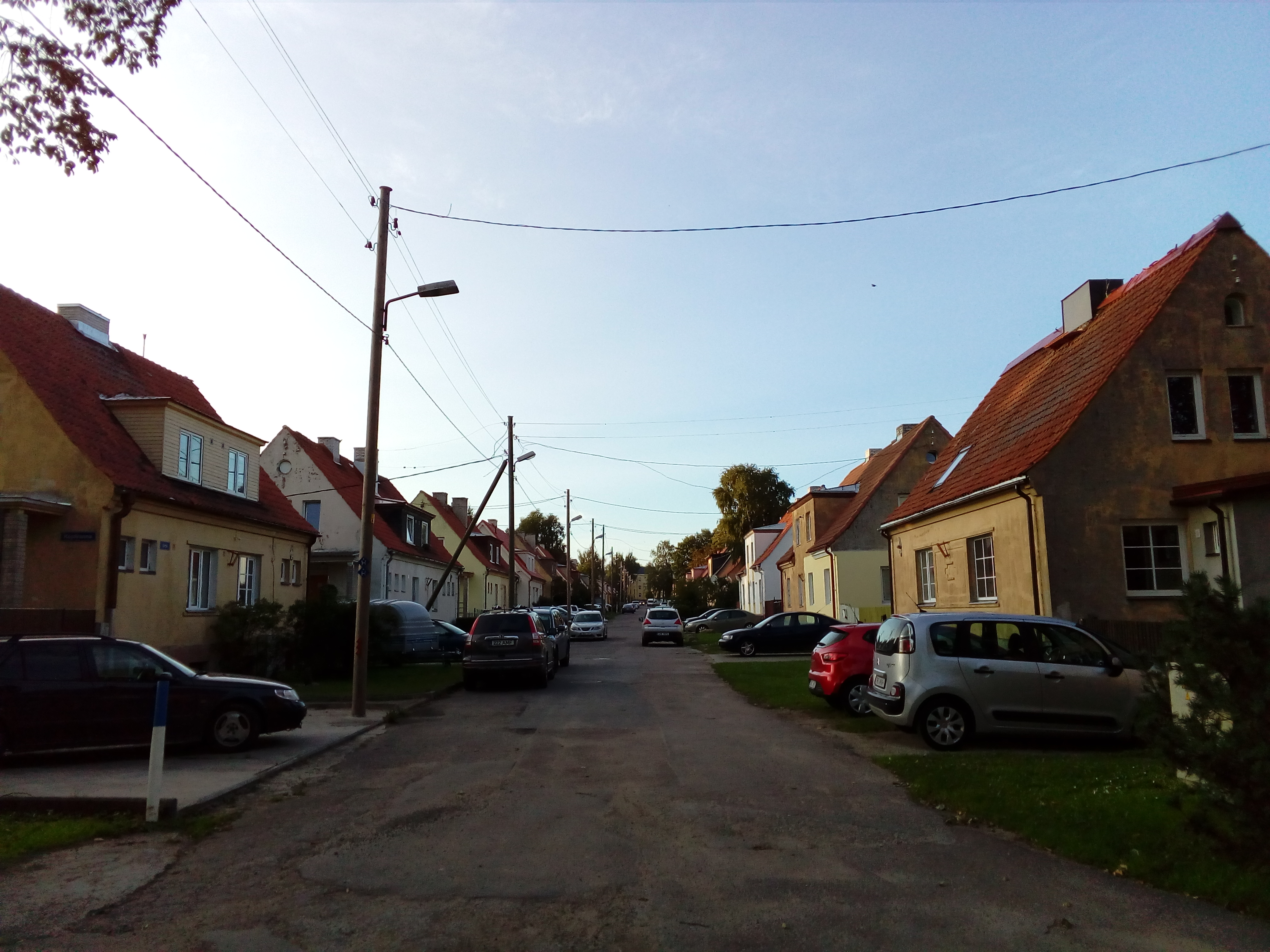 Sirbi tänav, Tallinn.